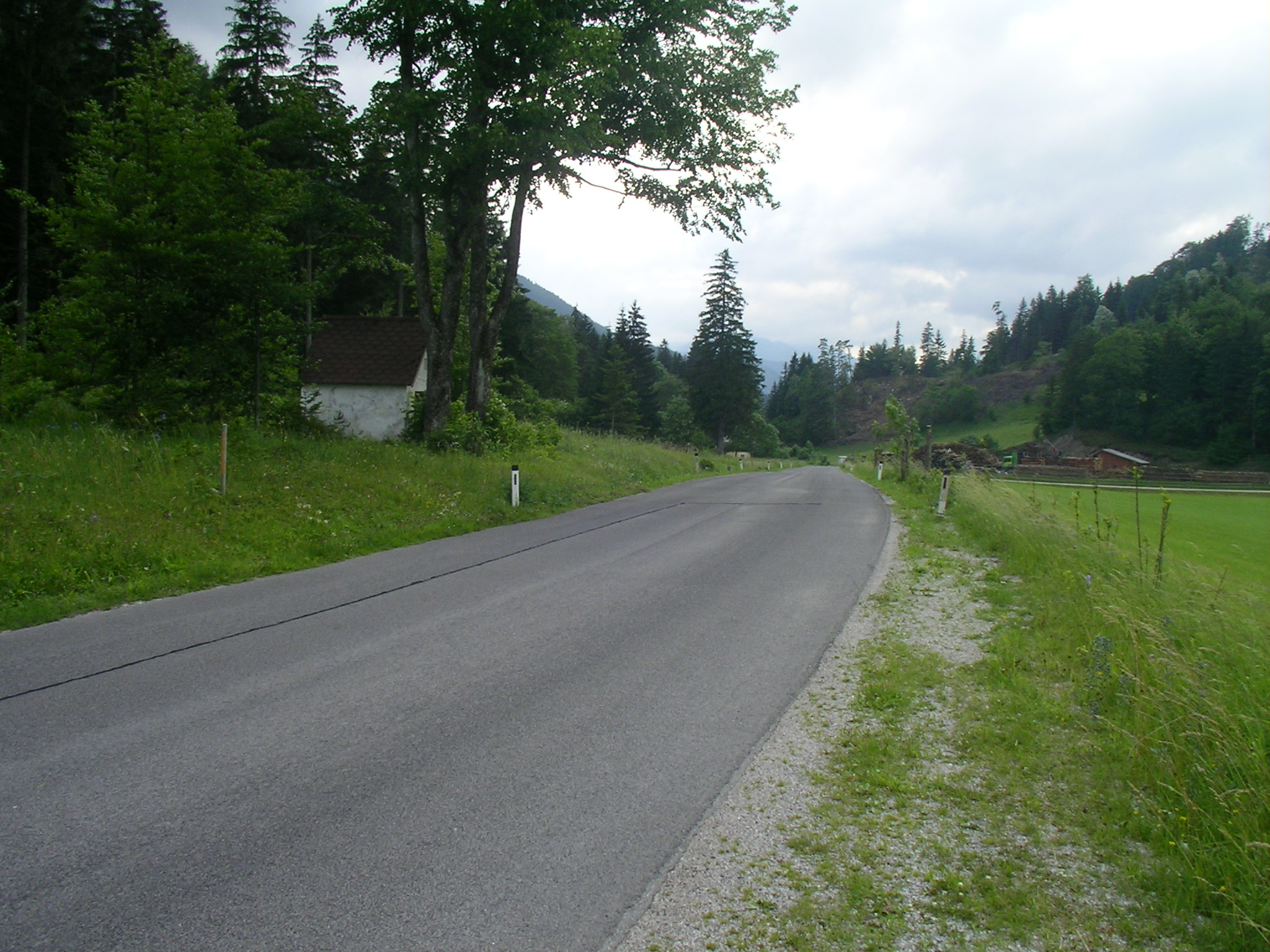 Klostertaler Gscheid, Passhöhe mit Kapelle